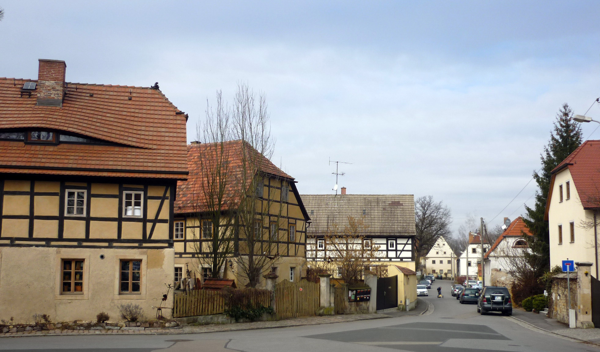 Alter Dorfkern Altcoschütz in Dresden-Coschütz